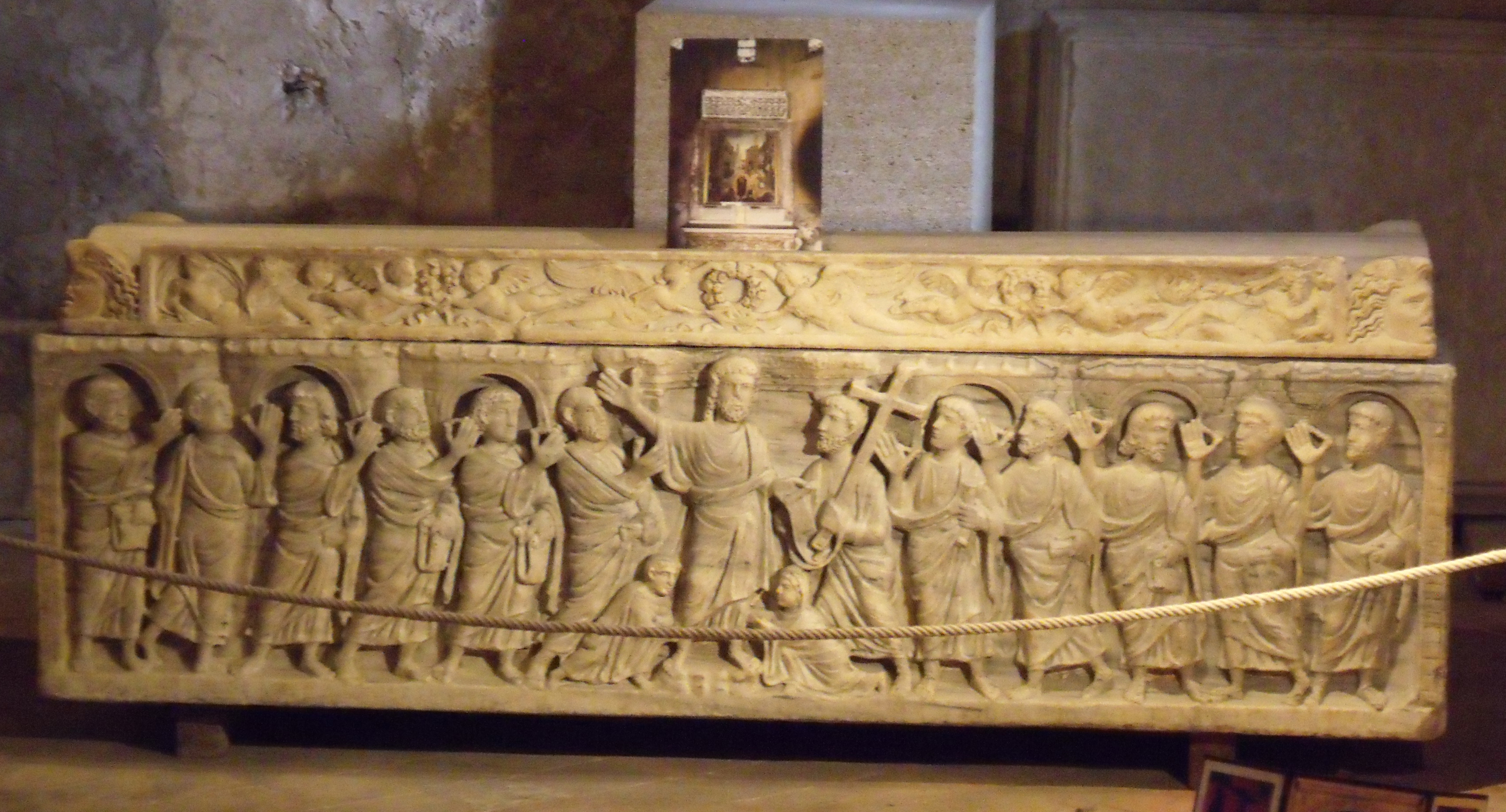 Sarcophage en marbre de saint Mitre (fin IVe siècle). Cathédrale Saint-Sauveur, Aix-en-Provence (France).